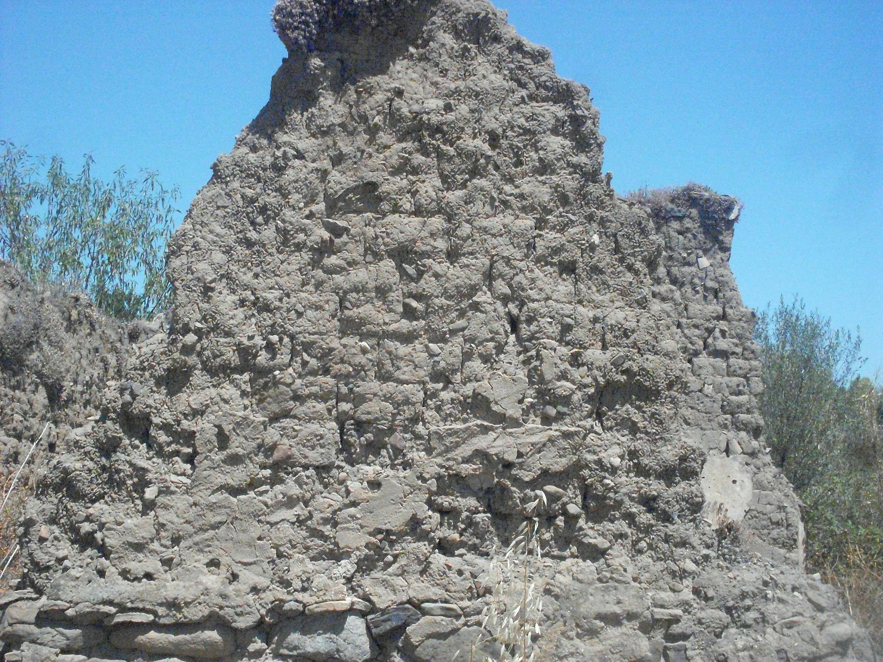 Relitto di muratura in mattoni di terra cruda (ladiri) con zoccolo in pietra (Sarroch, Sardegna) Unknown derelict wall built by adobes with basement by stones (sarroch, sardinia, italy)